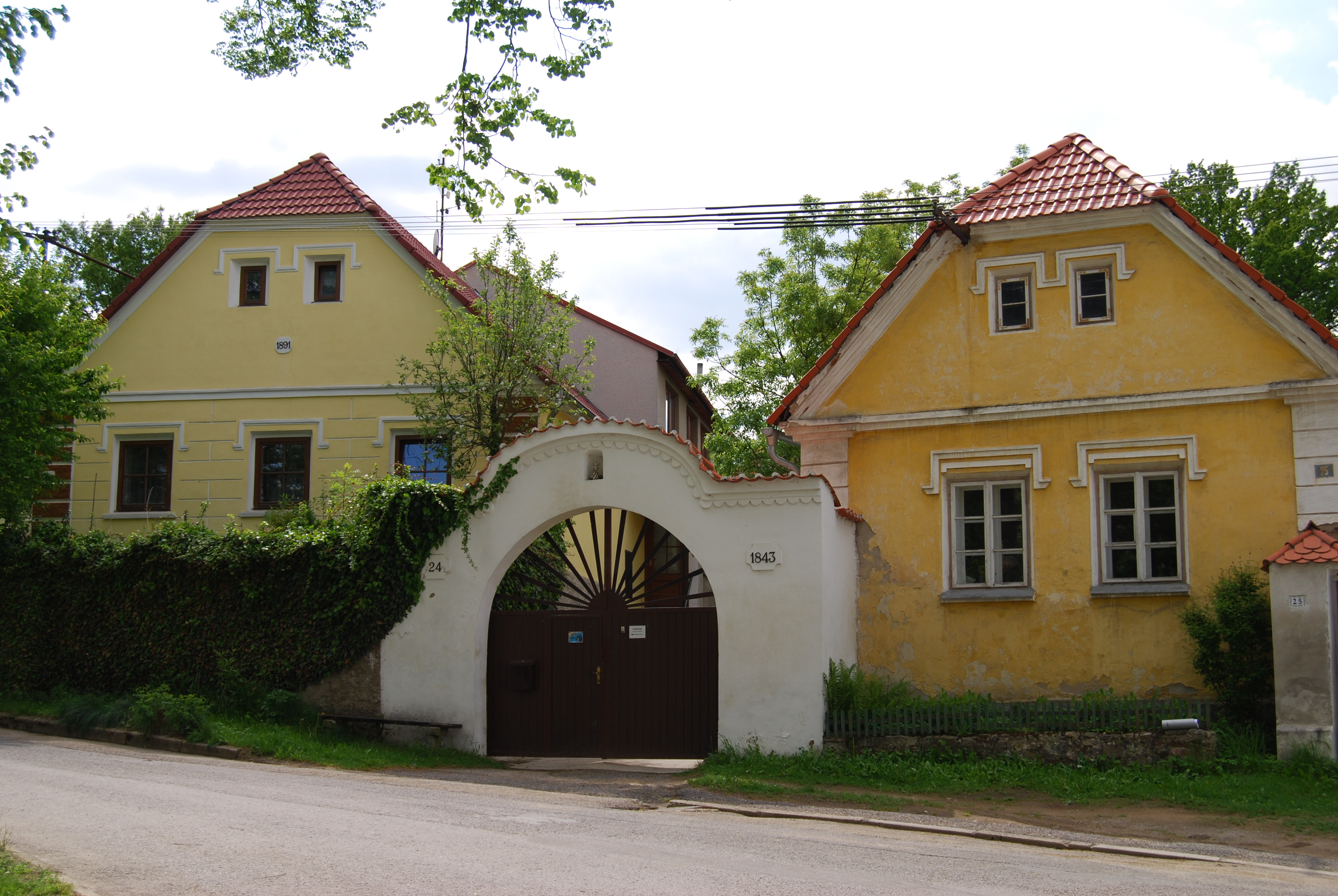 Usedlosti na západní straně návsi. Dolní Ostrovec je vesnice, část obce Ostrovec v okrese Písek. Česká republika.